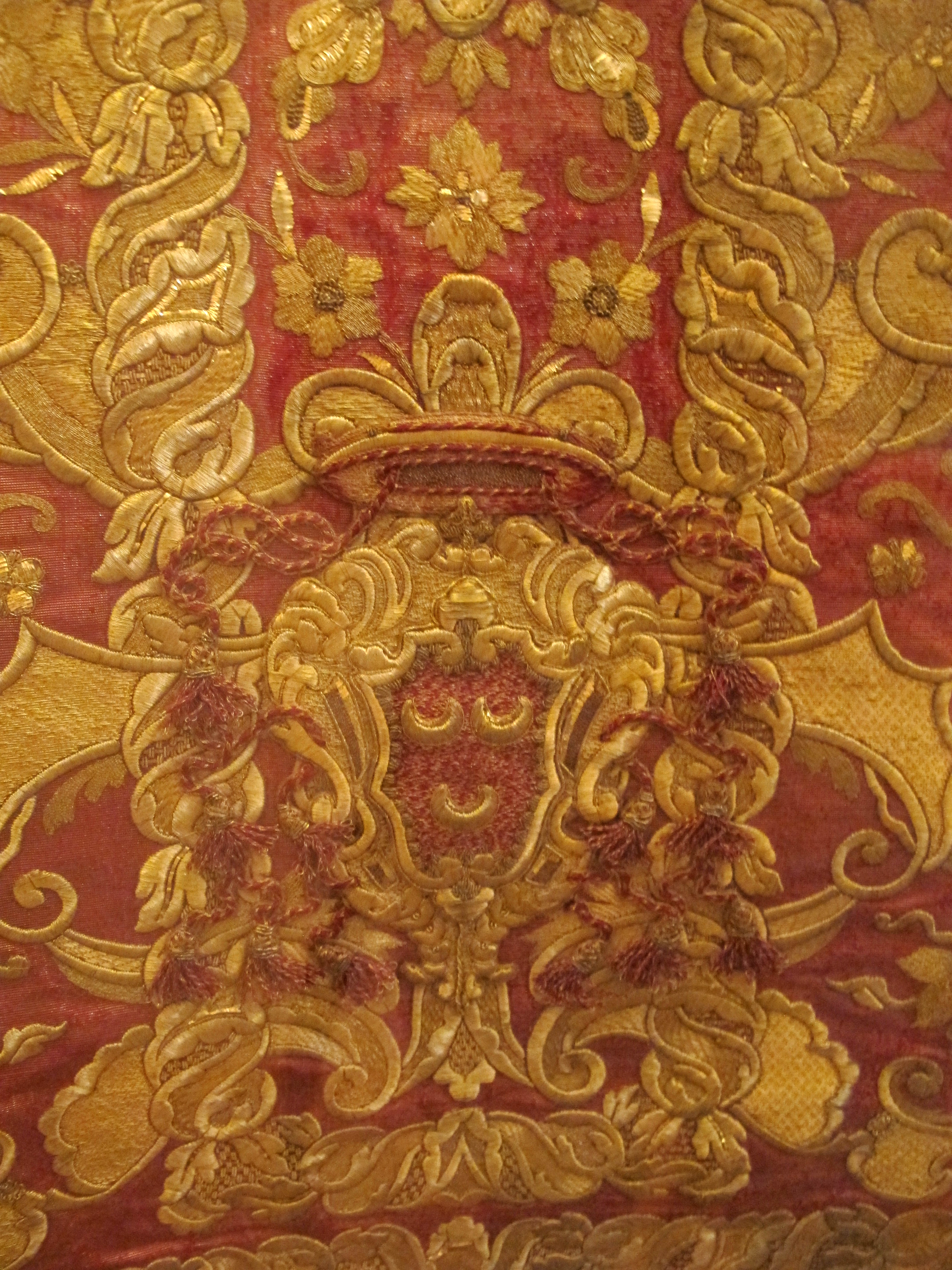 Ferrara - Museo della Cattedrale This is a photo of a monument which is part of cultural heritage of Italy.